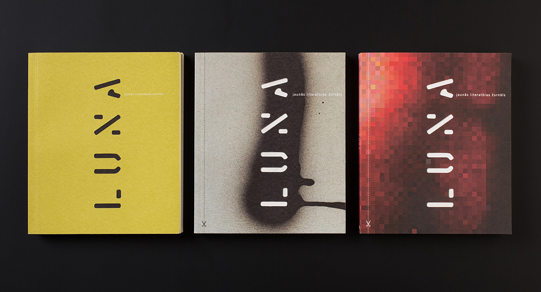 2003.–2004. gada numuri